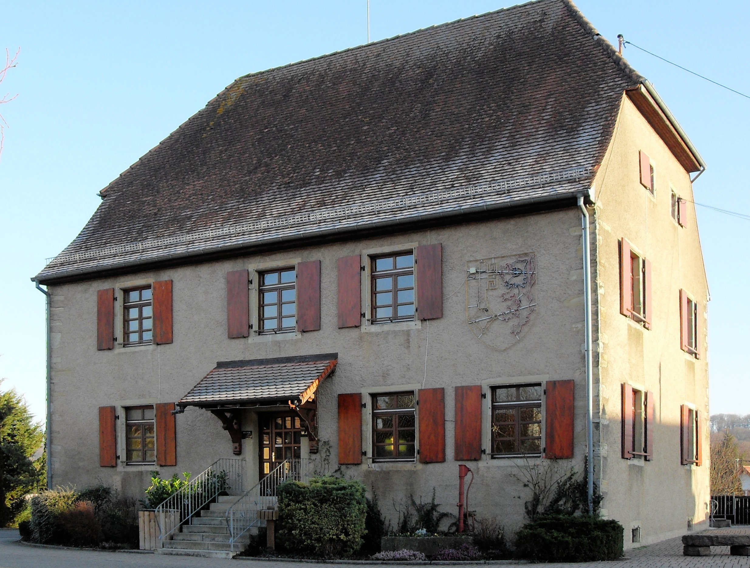 La mairie de Steinbrunn-le-Haut